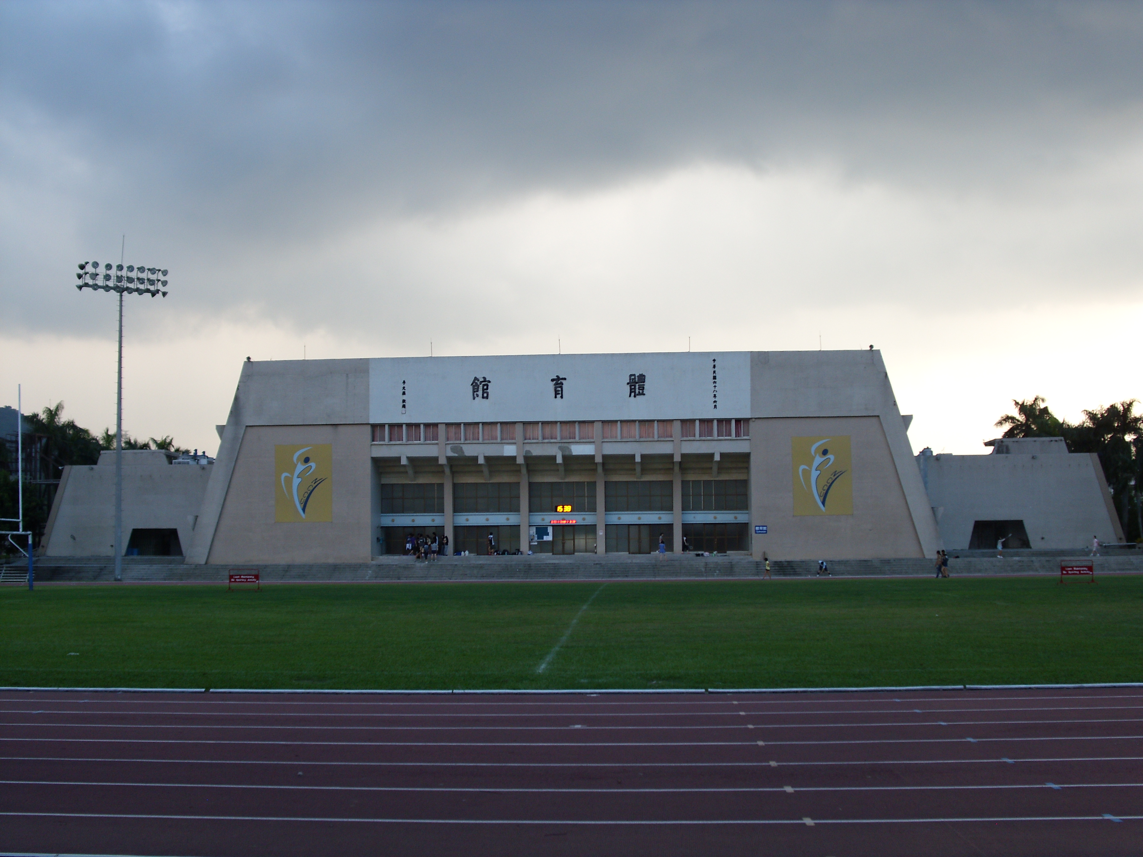 Bân-lâm-gú: 政治大學體育館